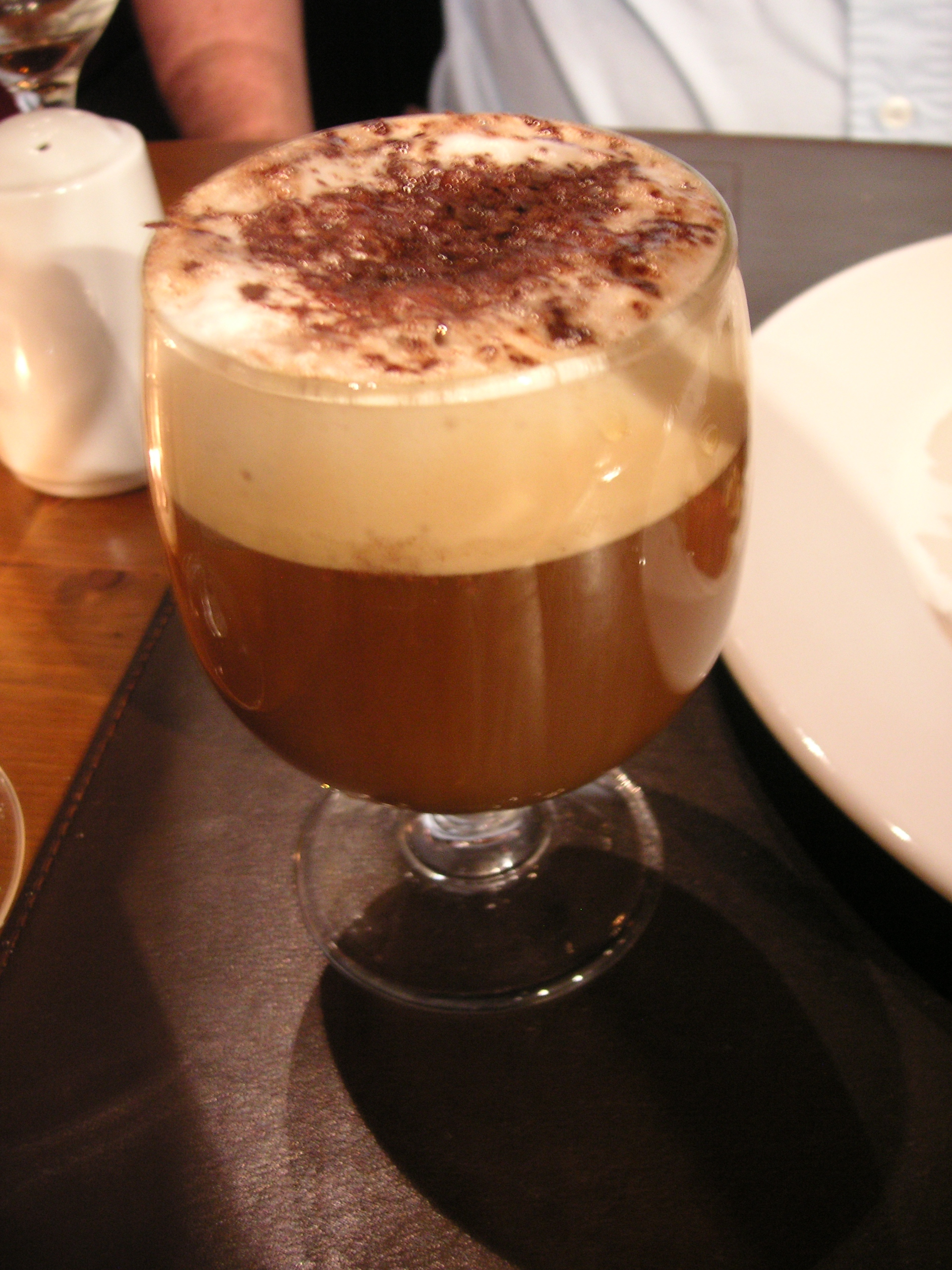 Celetto Restaurant